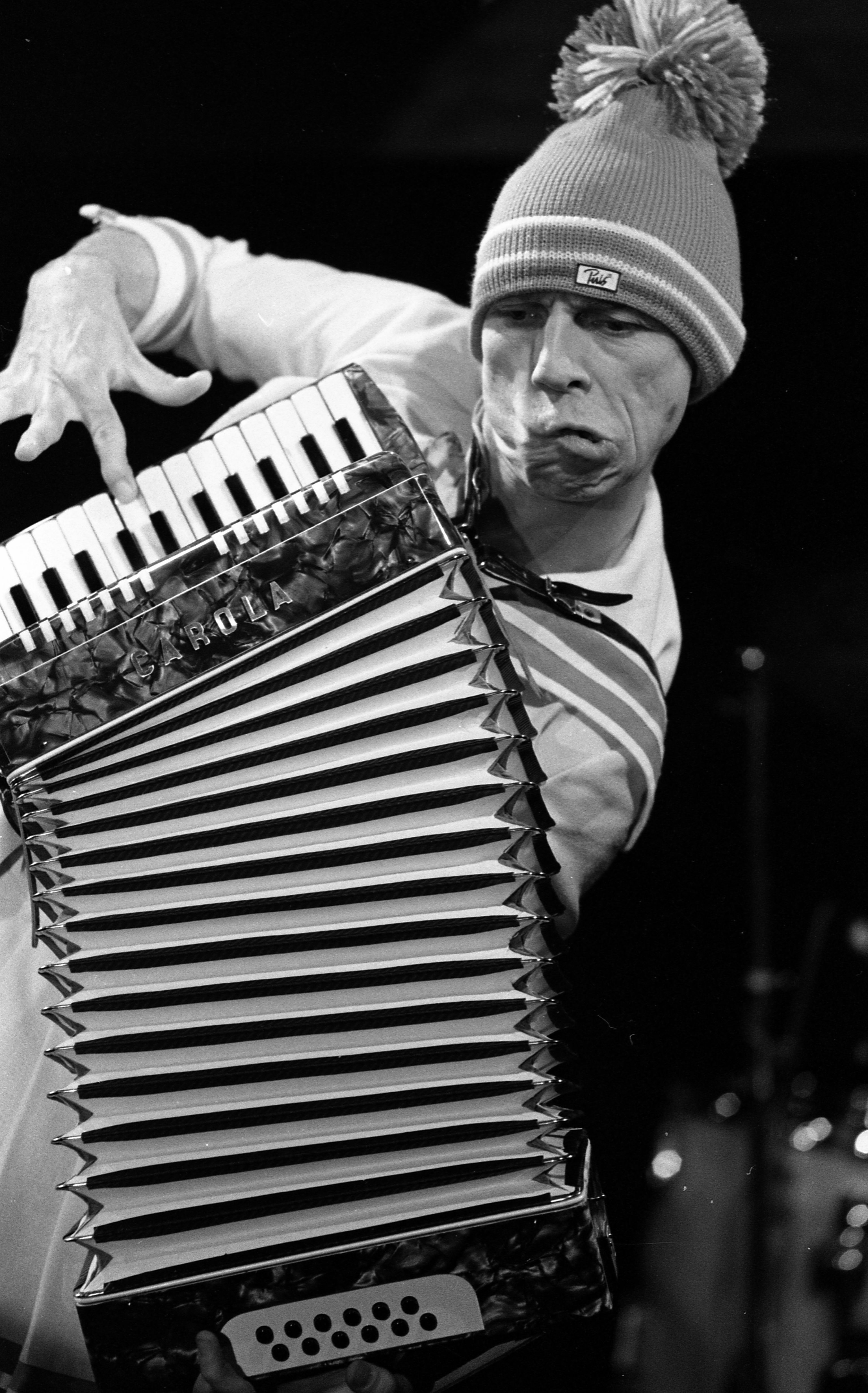 Stockholm, 1983. Foto: Trygve Indrelid. Arkivref.: PA-0797_U_11514_005_031